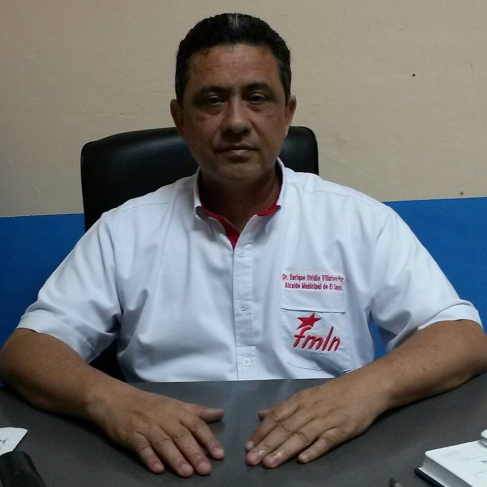 alcalde del sauce